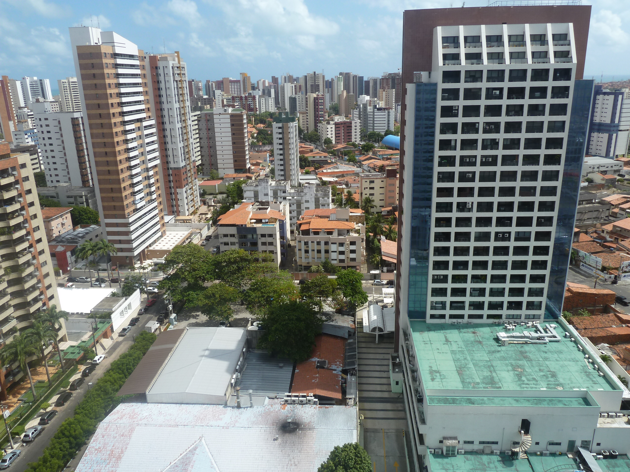 Fortaleza, CE, Brasil. Por cima!